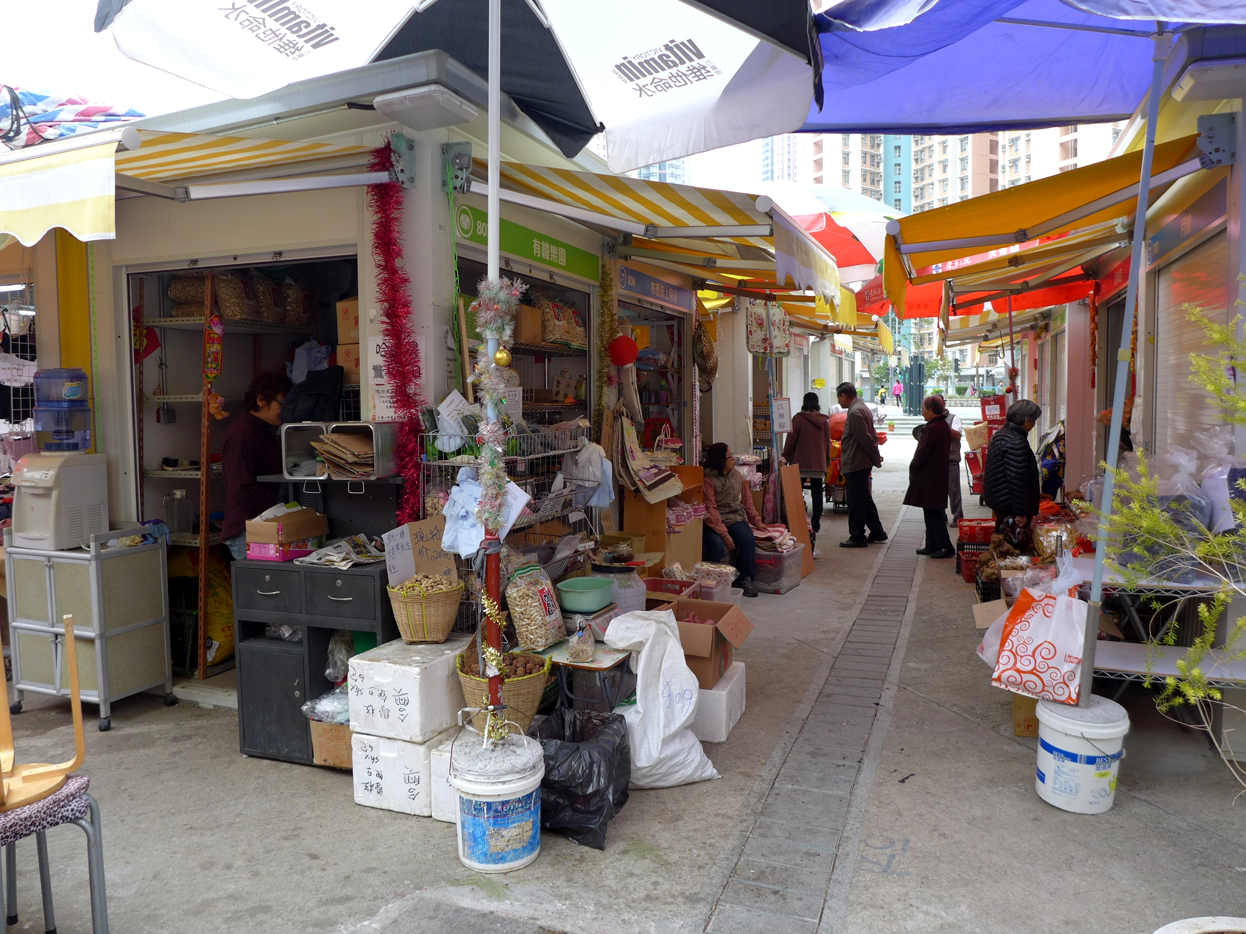 Tin Sau Bazaar shops view